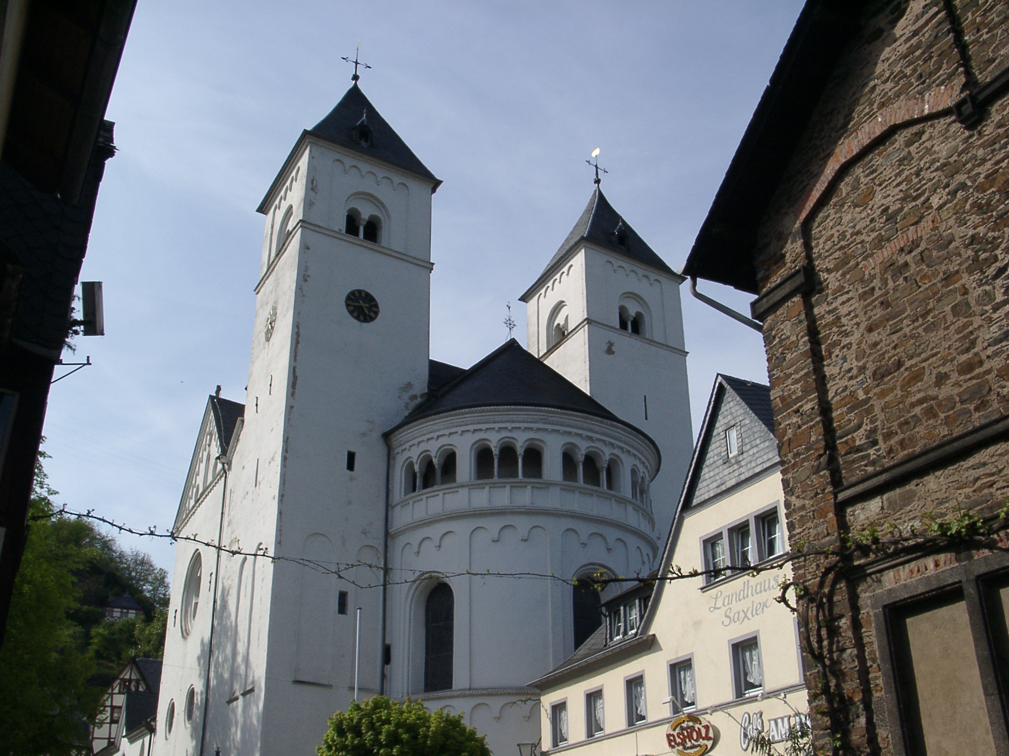 Chor der Stiftskirche in Karden - selbst fotografiert (Klaus Graf) 30.4.2005